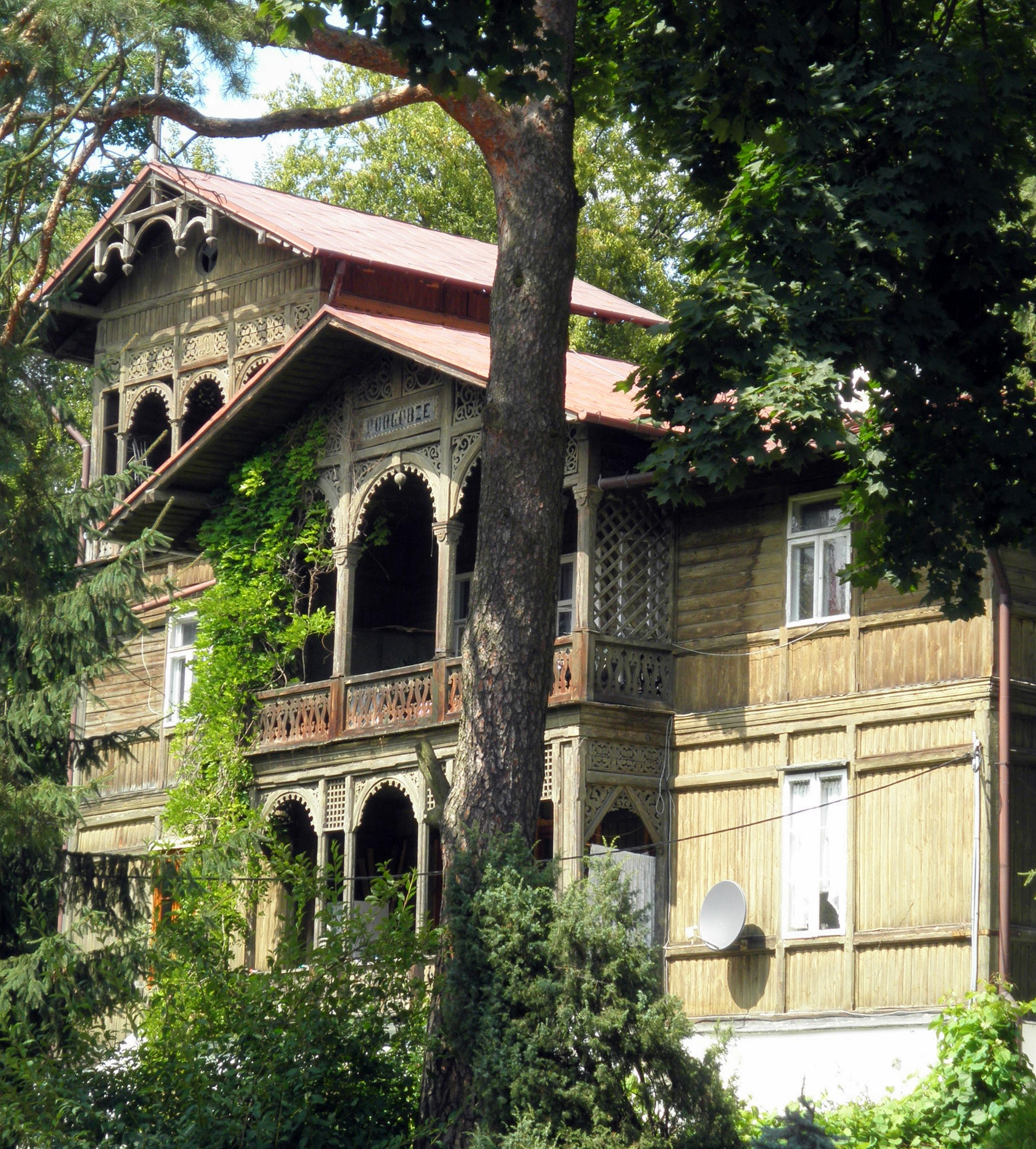 Willa "Podgórze" przy ul. Armatnia Góra 16 w Nałęczowie